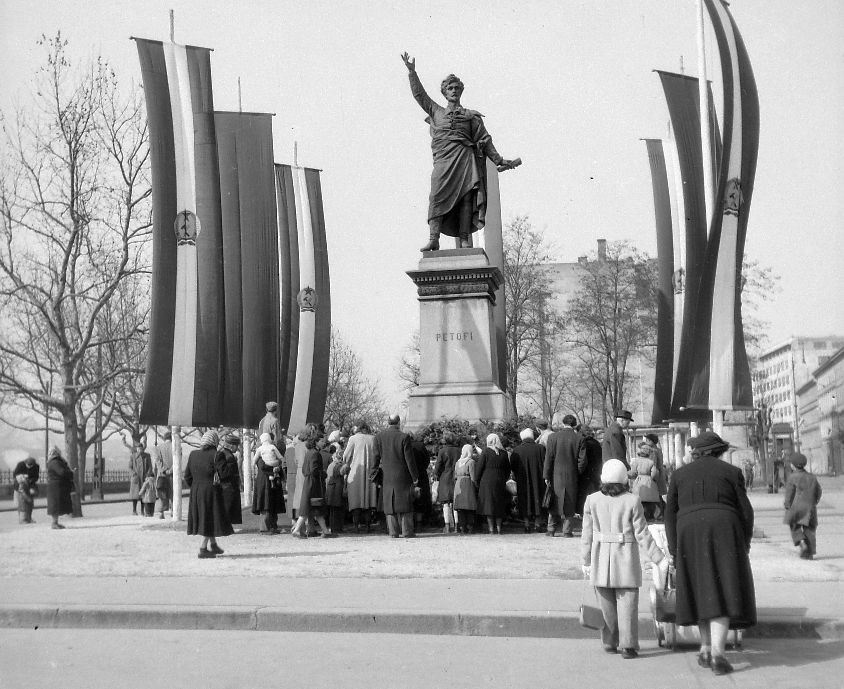 Petőfi tér, Petőfi Sándor szobra (Huszár Andor, 1882.). Location: Hungary, Budapest V. Tags: sculpture, flag, Budapest Title: Petőfi tér, Petőfi Sándor szobra (Huszár Andor, 1882.).